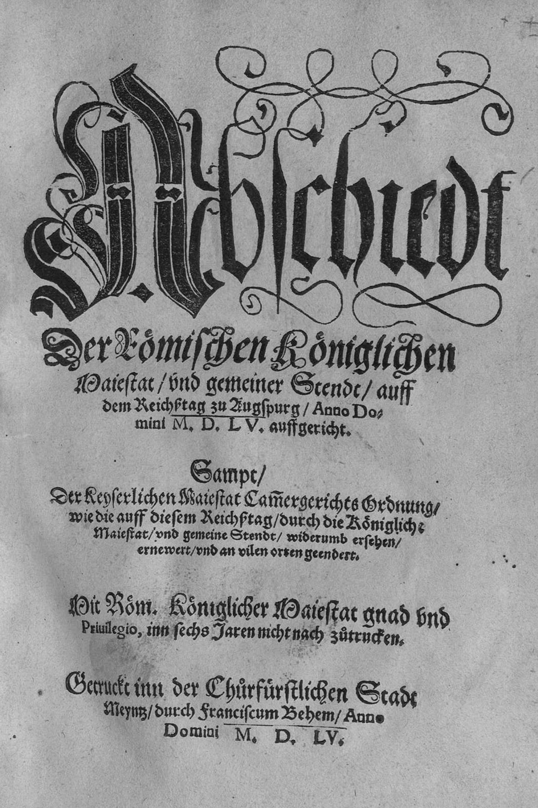 Titelblatt des Drucks des Augsburger Reichs- und Religionsfriedens Abschiedt der Röm. Königl. Majestat und gemeiner Stendt auf dem Reichßtag zu Augspurg a. D. 1555 auffgericht ..., Meyntz 1555 Mainz 1555